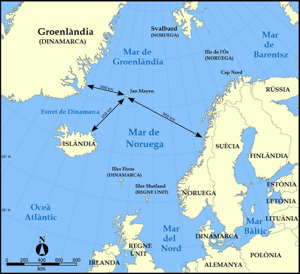 Mapa del mar de Noruega amb les distàncies entre Jan Mayen i els continents circumdants.